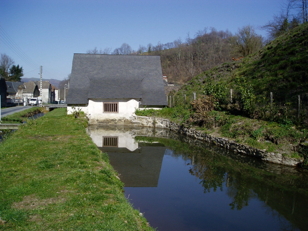 Photo du moulin banier lors de sa restauration en 2002. Auteur de la photographie.